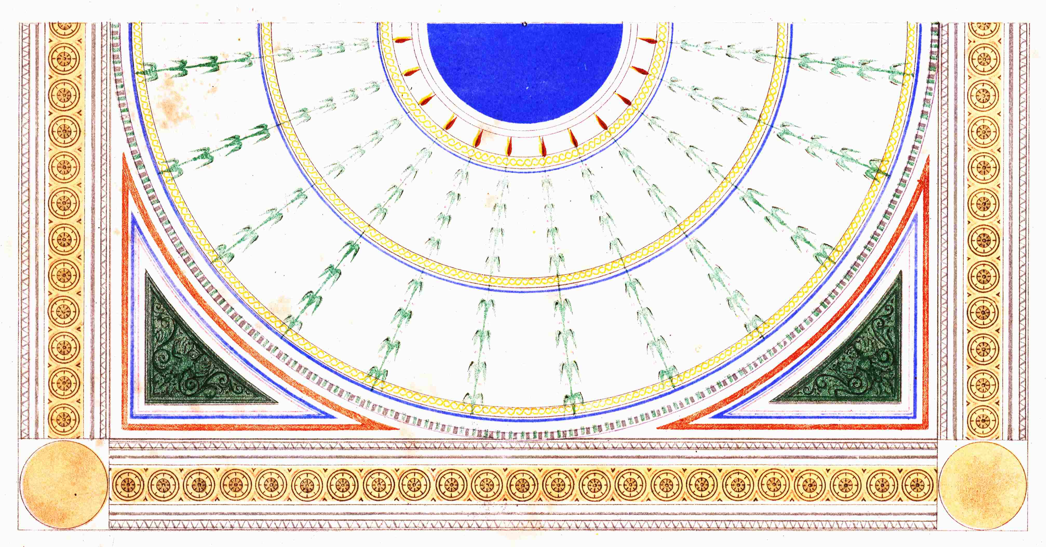 Berlin, Neues Museum: Decke Ethnographischer Saal